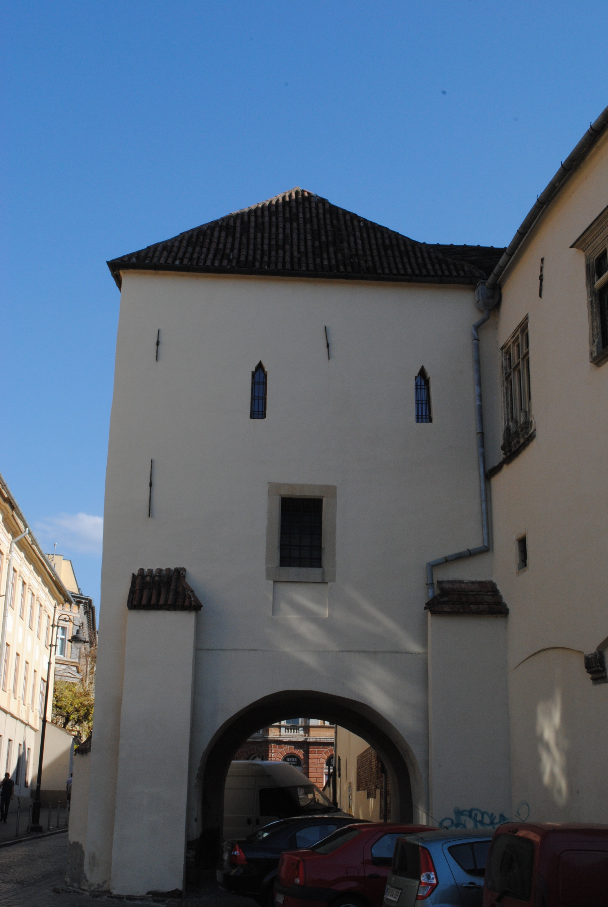 Casa Altenberger Pempflinger (Primăria Veche), azi Muzeul de Istorie, sec. XIV - XVIII